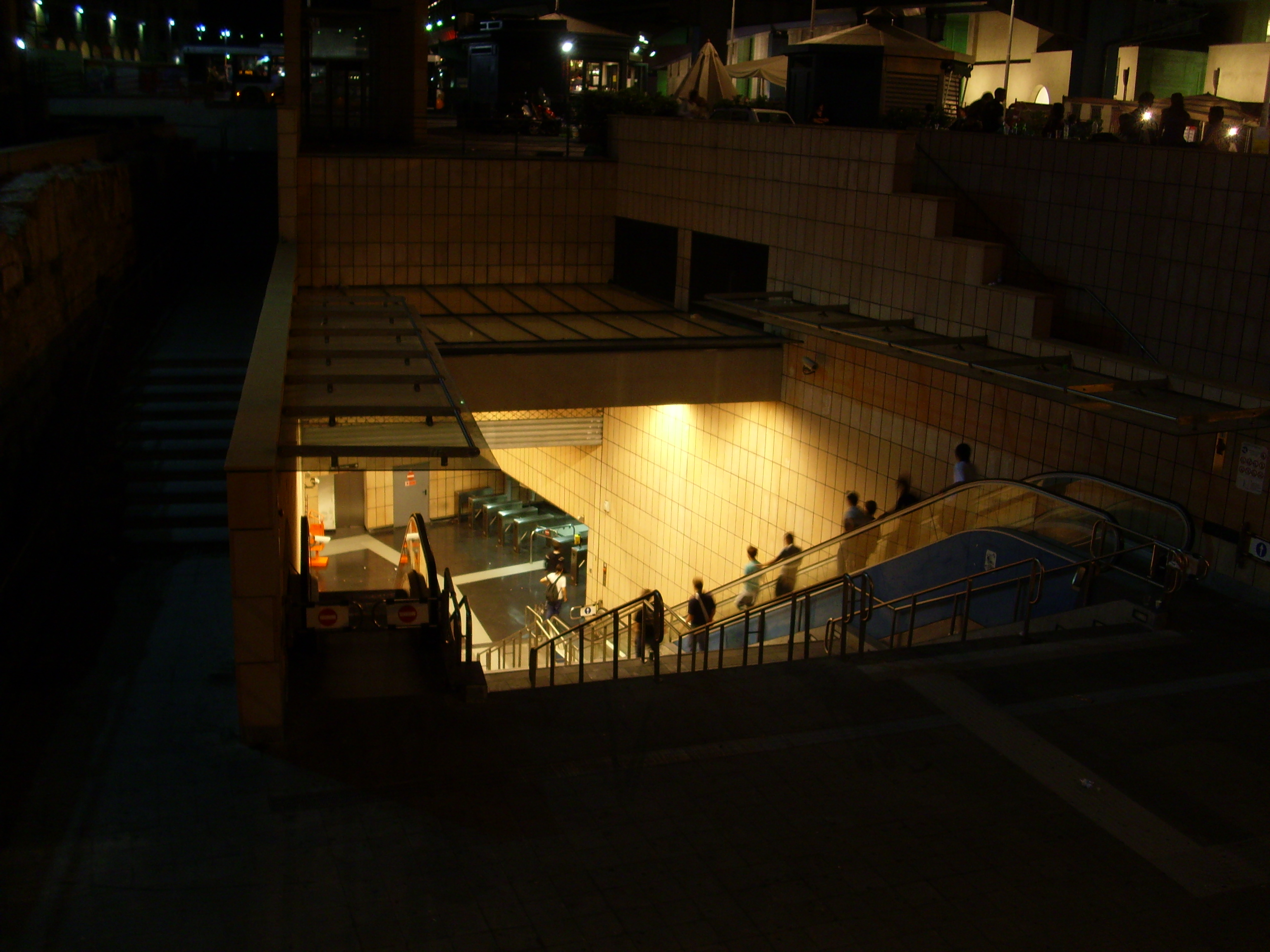 Ingresso della stazione di San Giorgio della Metropolitana di Genova durante la Notte Bianca del 15/09/2007